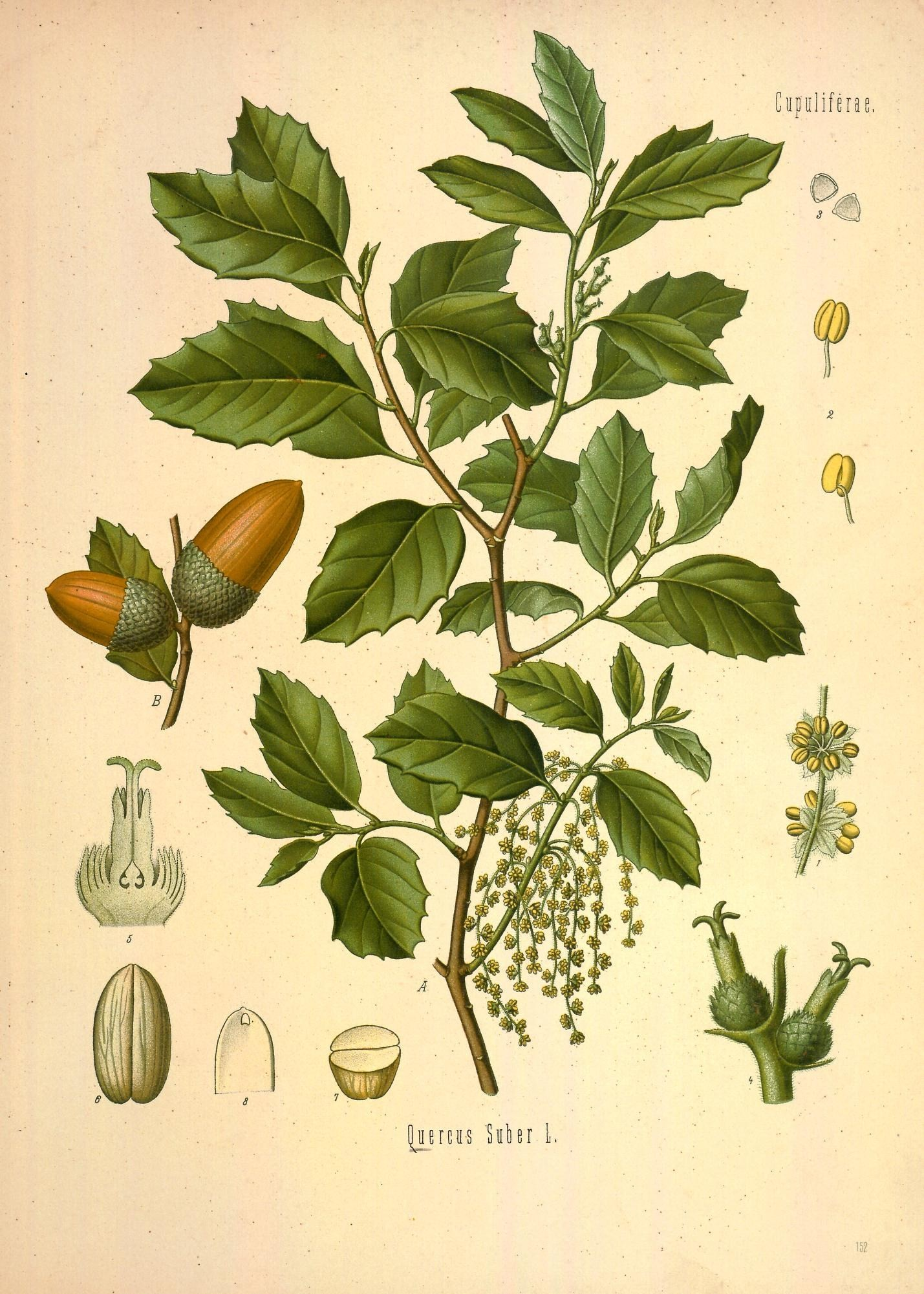 Korkeiche. A blühender Zweig, mit männlicher und weiblicher Blüthe, nat. Grösse; B Fruchtzweig desgl.; 1 Theil des männlichen Blüthenstandes, vergrössert; 2 Staubgefässe, desgl.; 3 Pollen, desgl.; 4 weiblicher Blüthenstand, desgl.; 5 weibliche Blüthe im Längsschnitt; 6 Same ohne Samenschale, desgl.; 7 und 8 derselbe im Quer- und Längsschnitt, desgl.